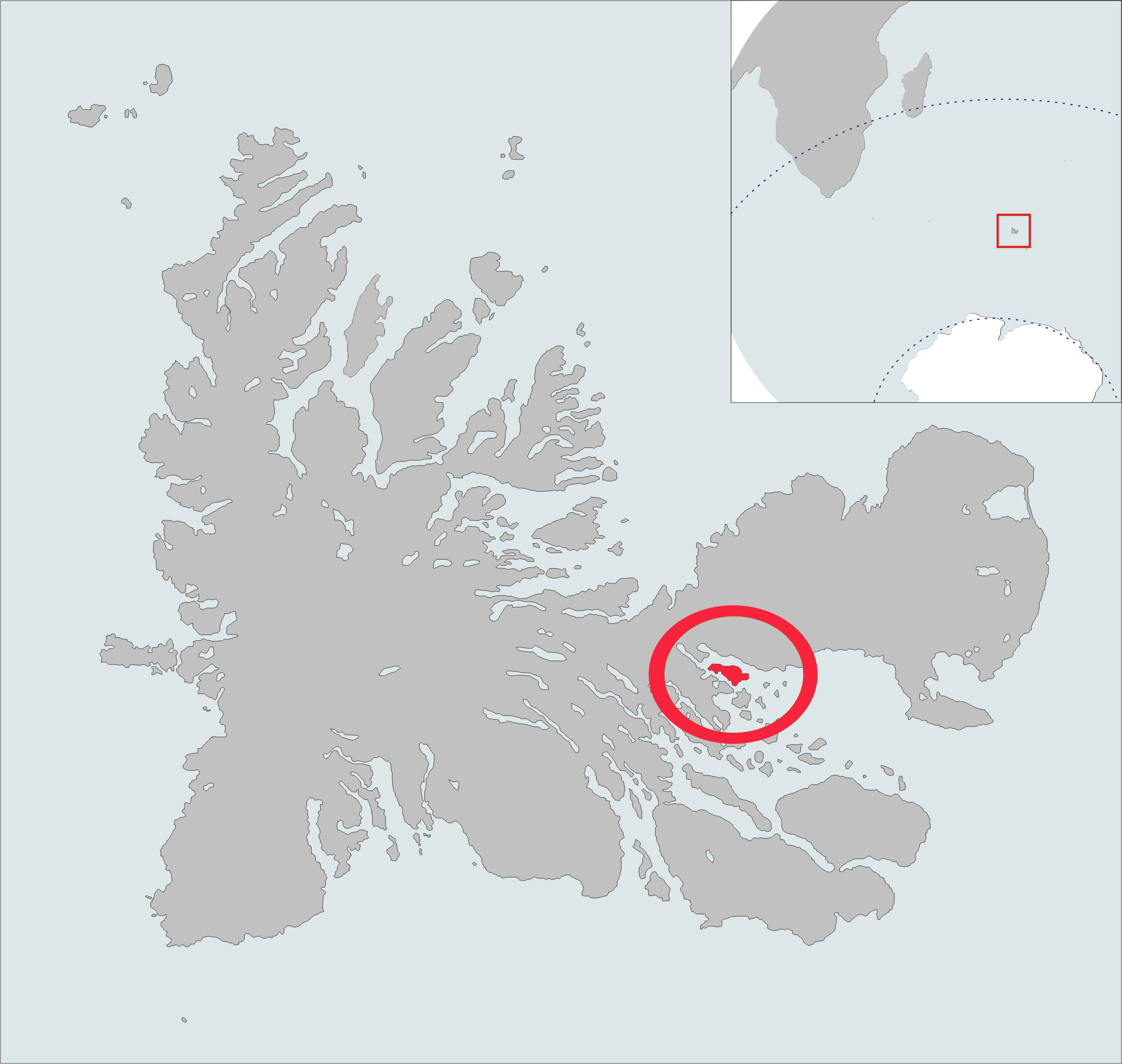 Position de l'île haute, dans l'archipel des Kerguelen.